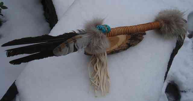 Indian Talking stick